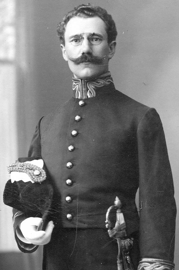 Historische Aufnahme von Paul Köttnitz aus dem Jahre 1906 vom Fotoatelier Hangen in Bad Neustadt